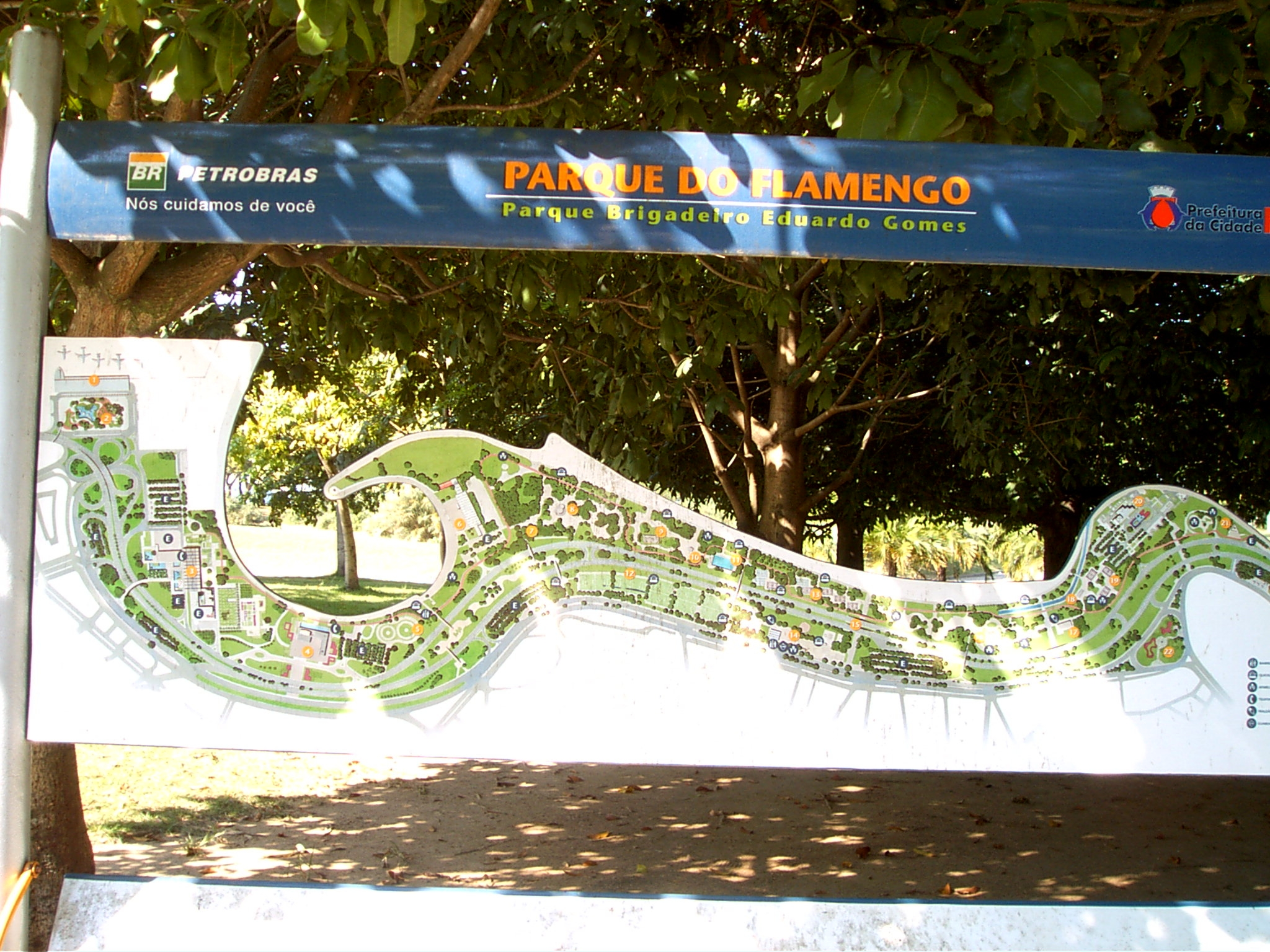 Aterro do Flamengo Mapa vista geral do Parque Flamengo is the name of a neighborhood (bairro) in Rio de Janeiro, Brazil. The parque, pictured here in 2005, shall become a location for the Pan American Games of 2007.